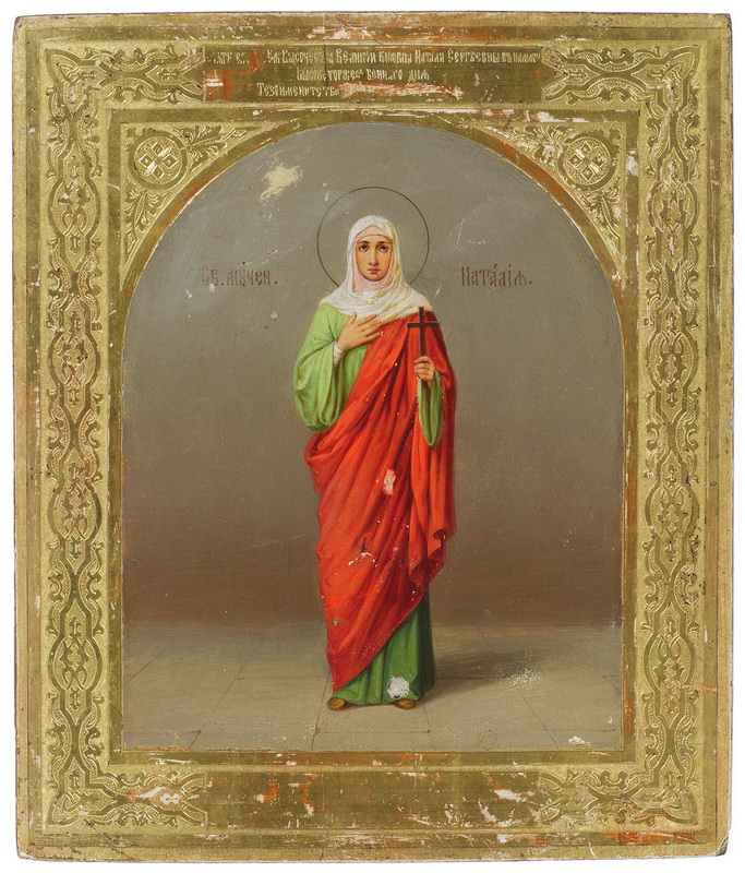 ИКОНА «СВЯТАЯ НАТАЛИЯ» Россия, Санкт-Петербург, 1914 – 1917 гг. Дерево; паволока, левкас, гравировка и чеканка по левкасу, масло, золочение. Надпись на верхней дробнице «…яти…е… Ея высочества Великой Княгини Наталiи Сергеевны въ память / Высокоторжественнаго дня / Тезоименитства…». Образ, несомненно, был исполнен в хорошей иконописной мастерской. Доски основы идеально обработаны и плотно склеены, сквозные шнопки тщательно ошкурены, на лицевую сторону наклеена толстая – вероятно, льняная домотканая – паволока, которая хорошо держит левкас. Высоким качеством также отличается чеканка по левкасу и золочение. Живопись исполнена именно в том стиле, который должен был импонировать европейски образованной имениннице: лик святой мастерски передан пастозными мазками, фигура имеет объем, одежды драпируются тяжелыми складками. Согласно надписи на верхнем поле, образ был поднесен великой княгине Наталии Сергеевне в день ее тезоименинства.икона представляет собой качественный образец русского церковного искусства начала ХХ столетия. Ее историко-культурное значение определяется личностью владелицы – Натальи Сергеевны Шереметьевской (Брассовой-Романовой), которую брат последнего русского царя называл «своей самой дорогой и блестящей звездой». Фактически икона является редкой реликвией дома Романовых, чем определяется ее коллекционная и музейная ценность.